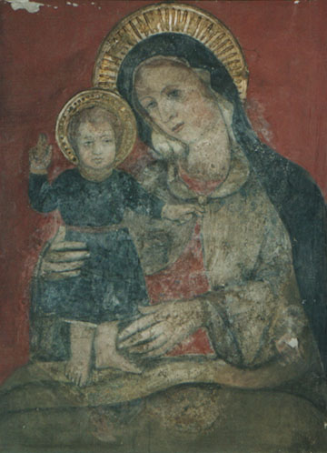 Giovanni da Riolo - Madonna del Rosario affresco staccato Chiesa di San Pretronio - Castel Bolognese